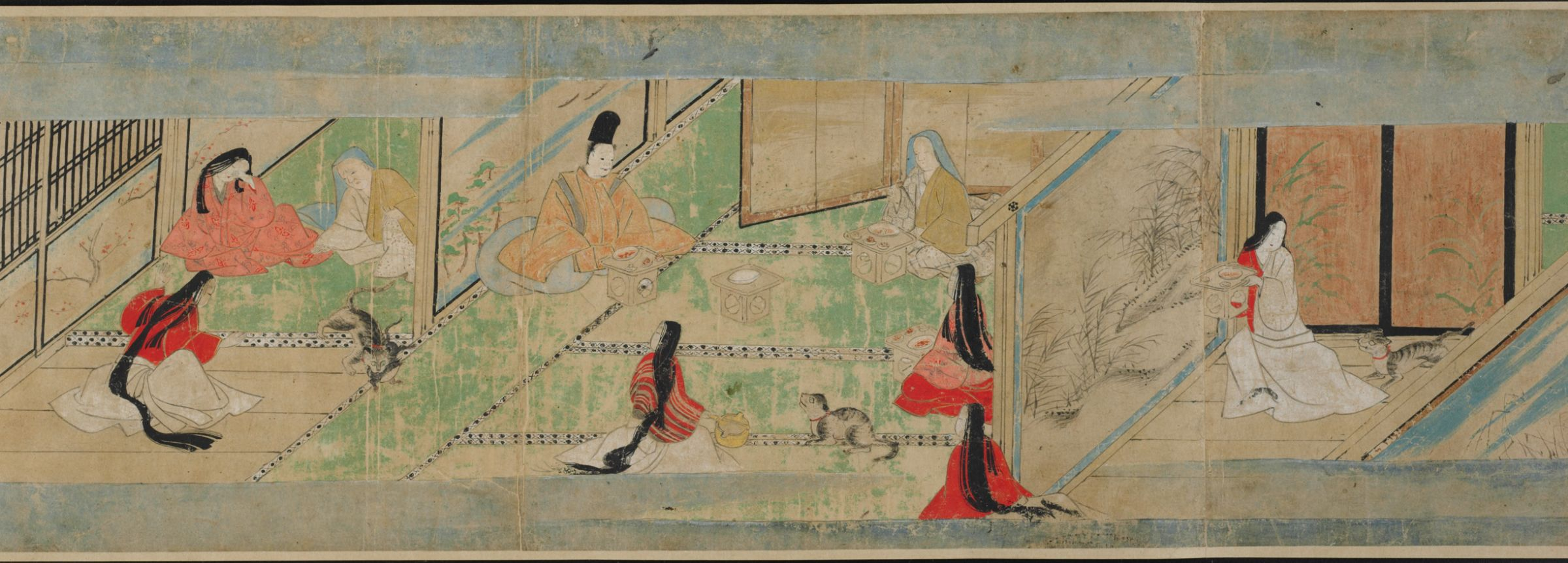 Nezumi soshi emaki, H. 16.7 x L. 431 cm, attribué à Tosa Mitsunobu (actif 1469-1522). Harvard Art Museums. N° 1985.445. Vue 11.